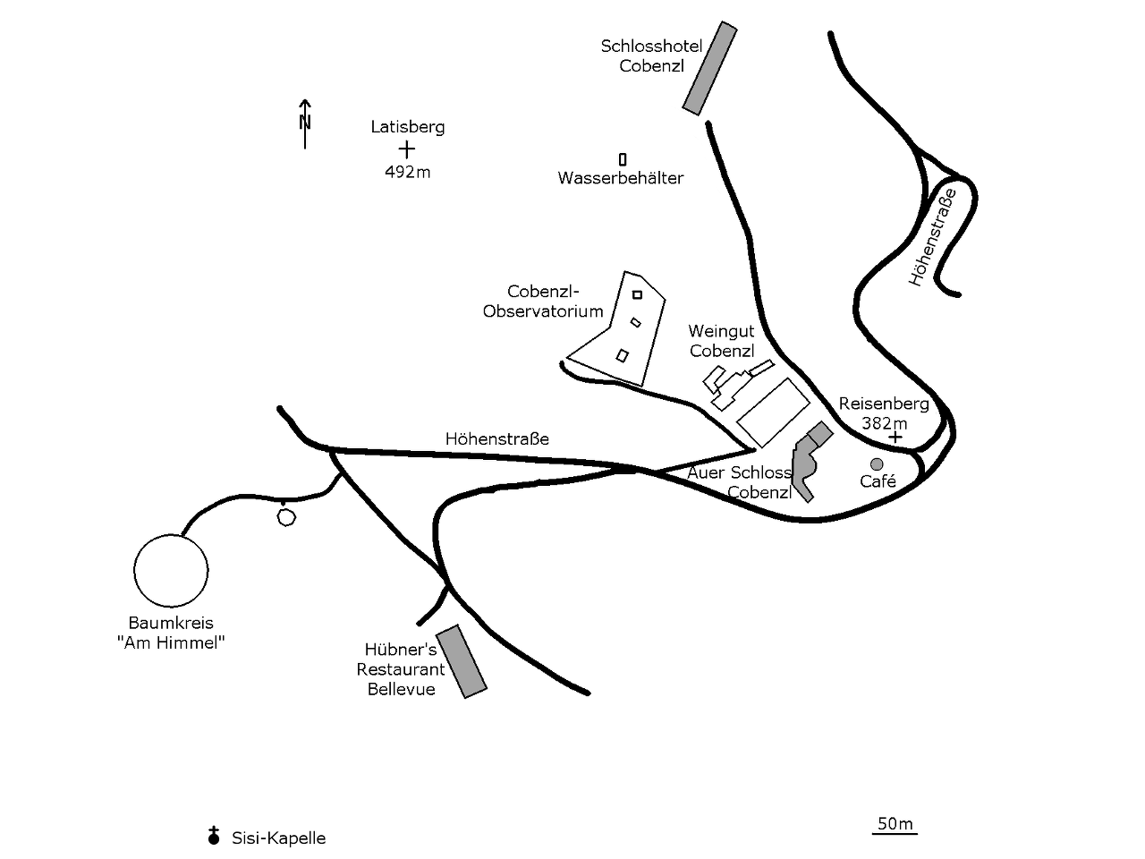 Plan der Gebäude und Anlagen am Cobenzl seit 1907